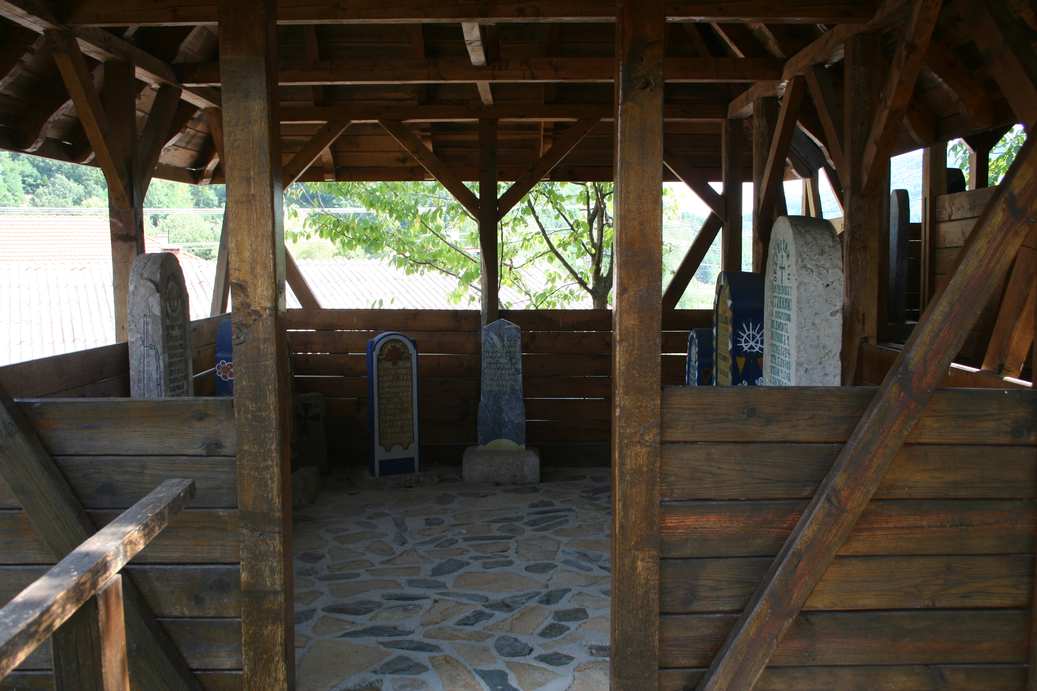 Crkva brvnara Seča Reka